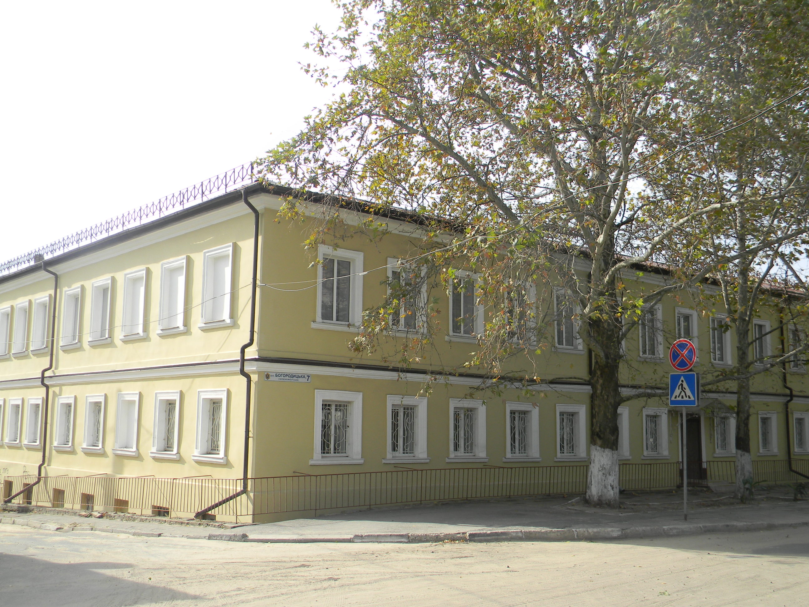 Будинок, в якому виступав з лекціями Д. І. Яворницький, Херсон, вул. Богородицька, 7